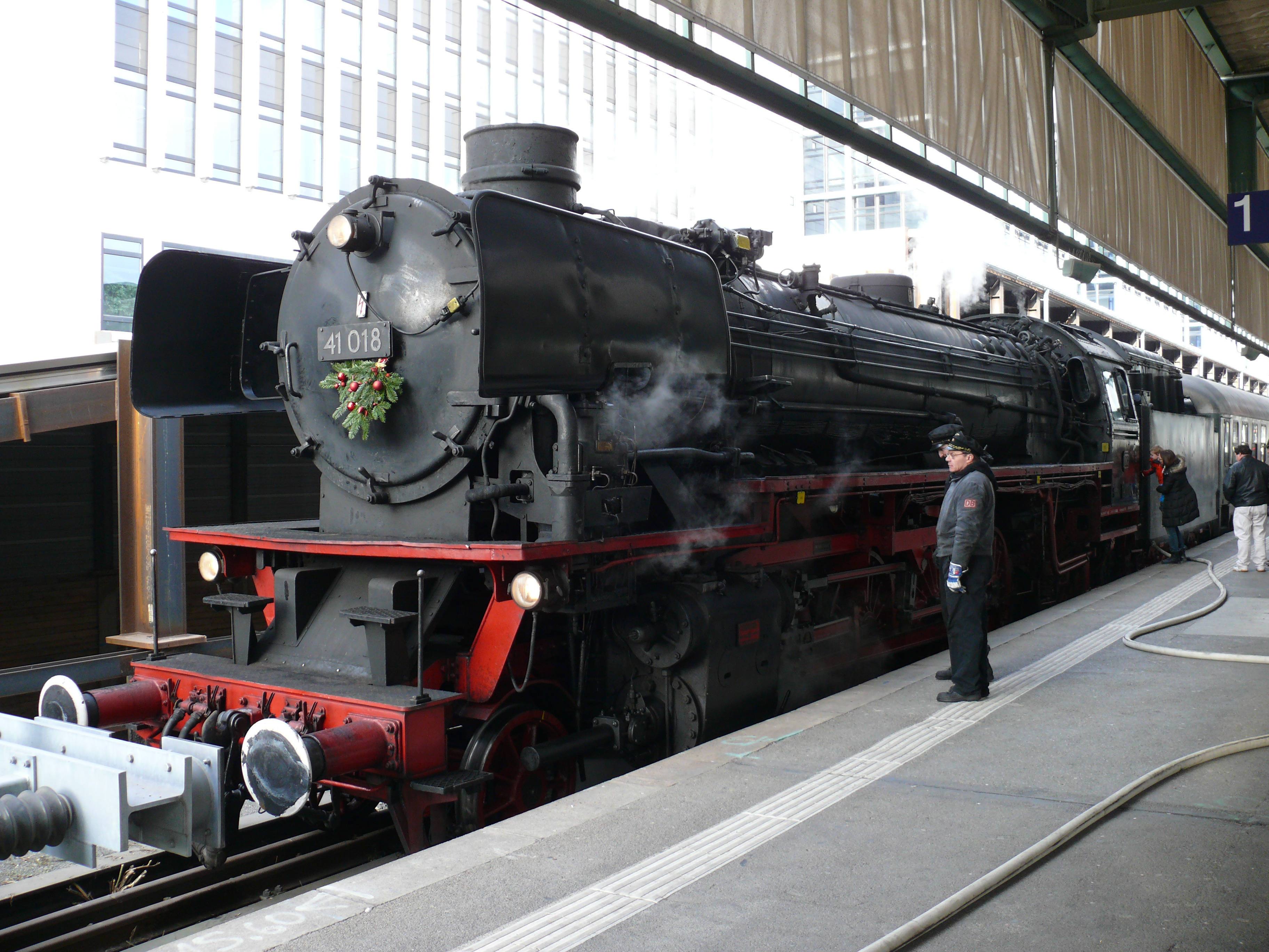 Die Dampflokomotive 41 018 am Stuttgarter Hauptbahnhof, bei einer Sonderfahrt im Dezember 2016.